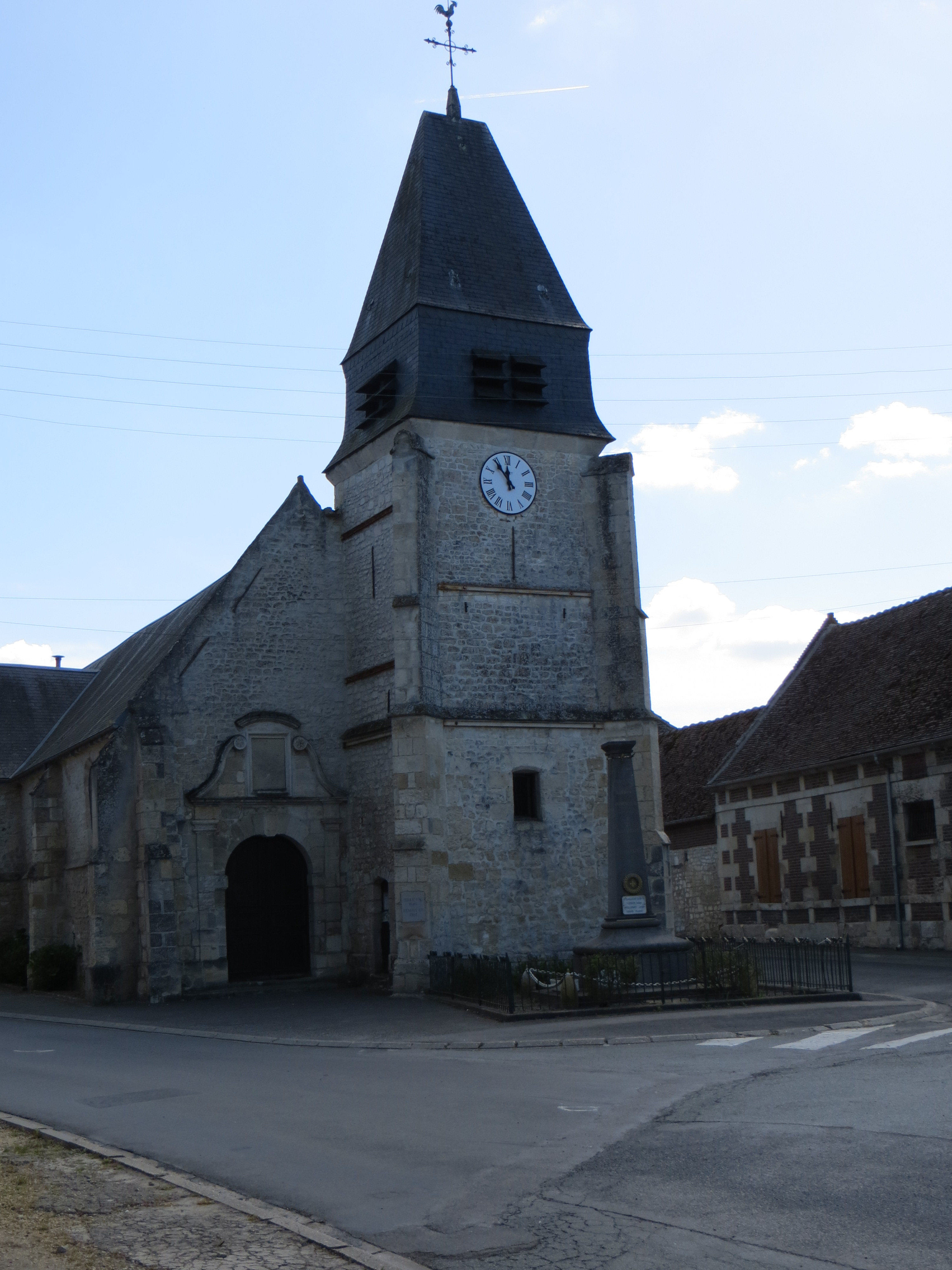 Vue générale de l'église